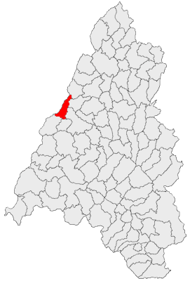 Categorie:Hărţi ale judeţului Bihor